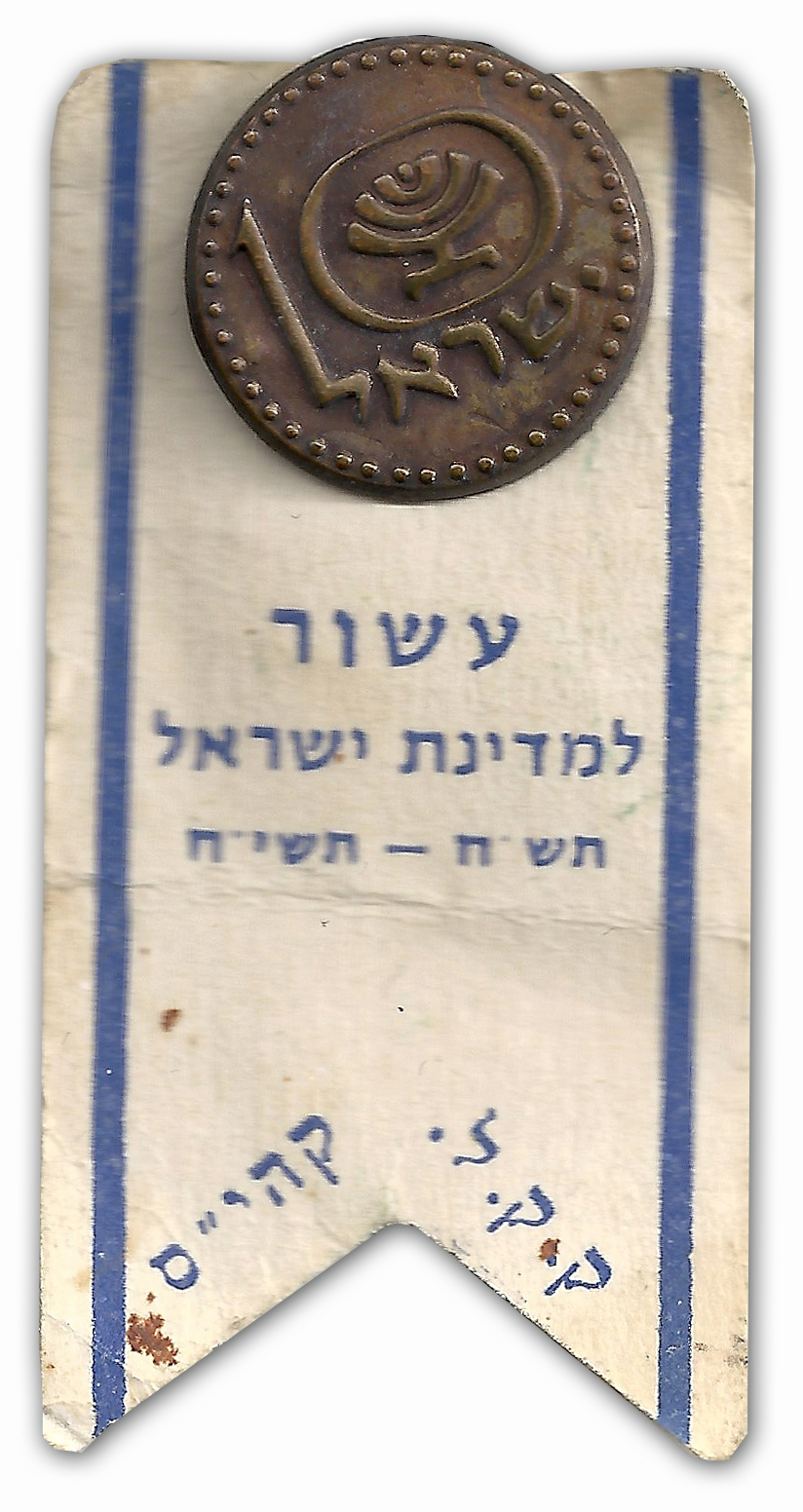 ועדת העשור - סיכה